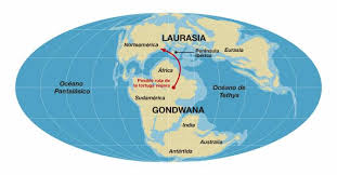 lavrasya kıtasının olusum şekli